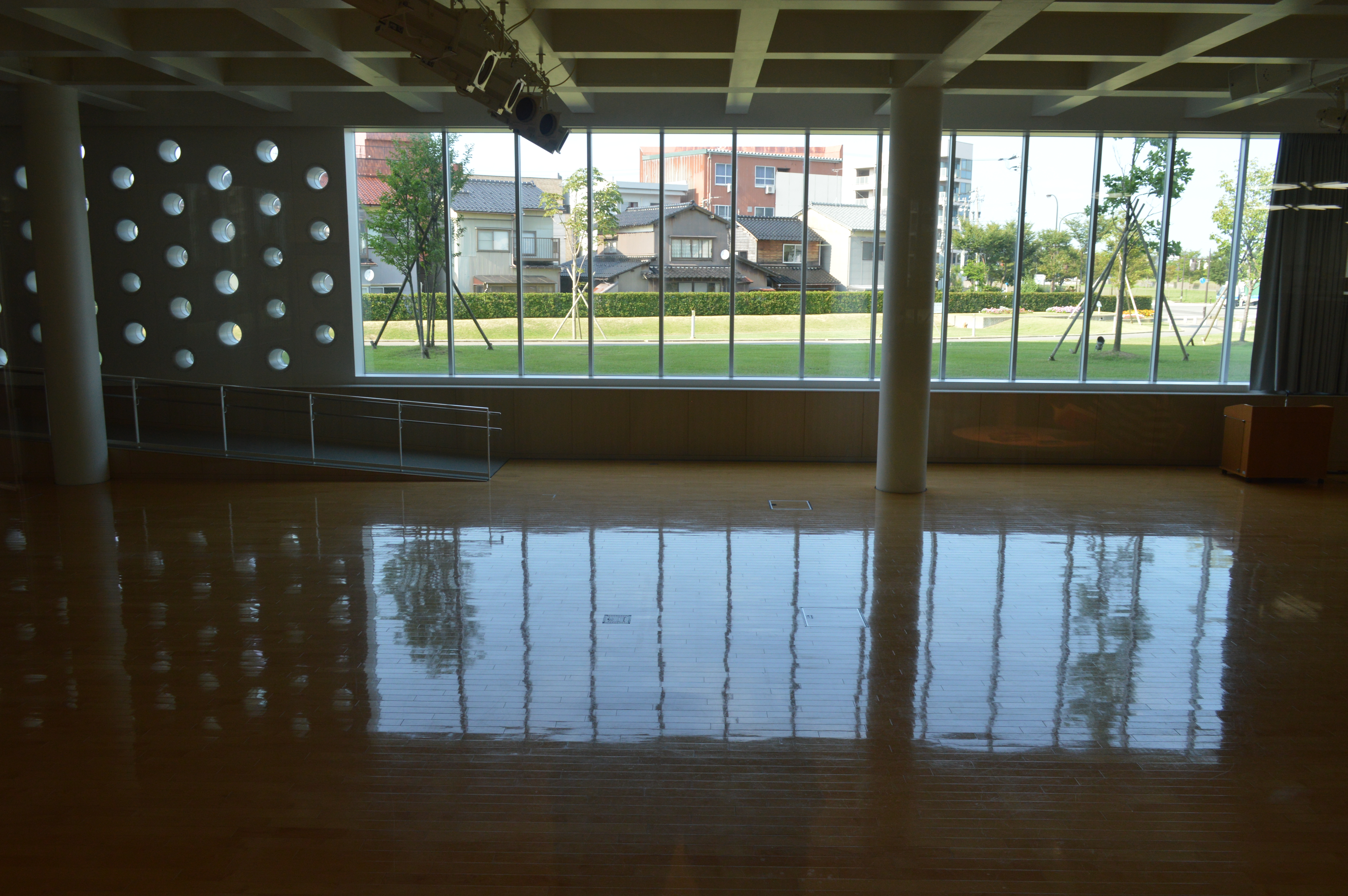 石川県金沢市 金沢海みらい図書館。金沢市図書館のひとつ。1階の交流ホール。